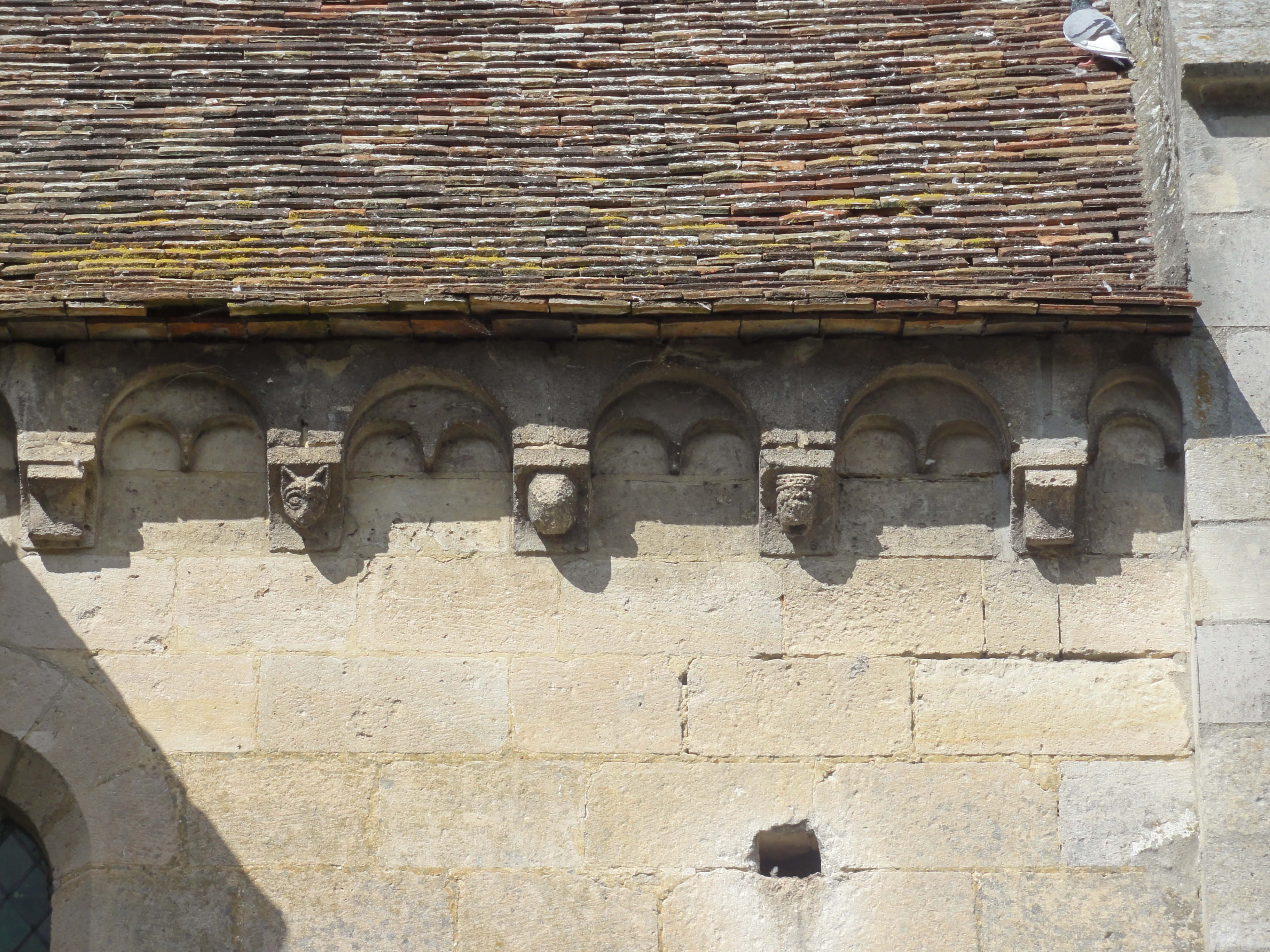 Église Saint-Pierre-aux-Liens-et-Saint-Étienne de Brignancourt - voir titre.